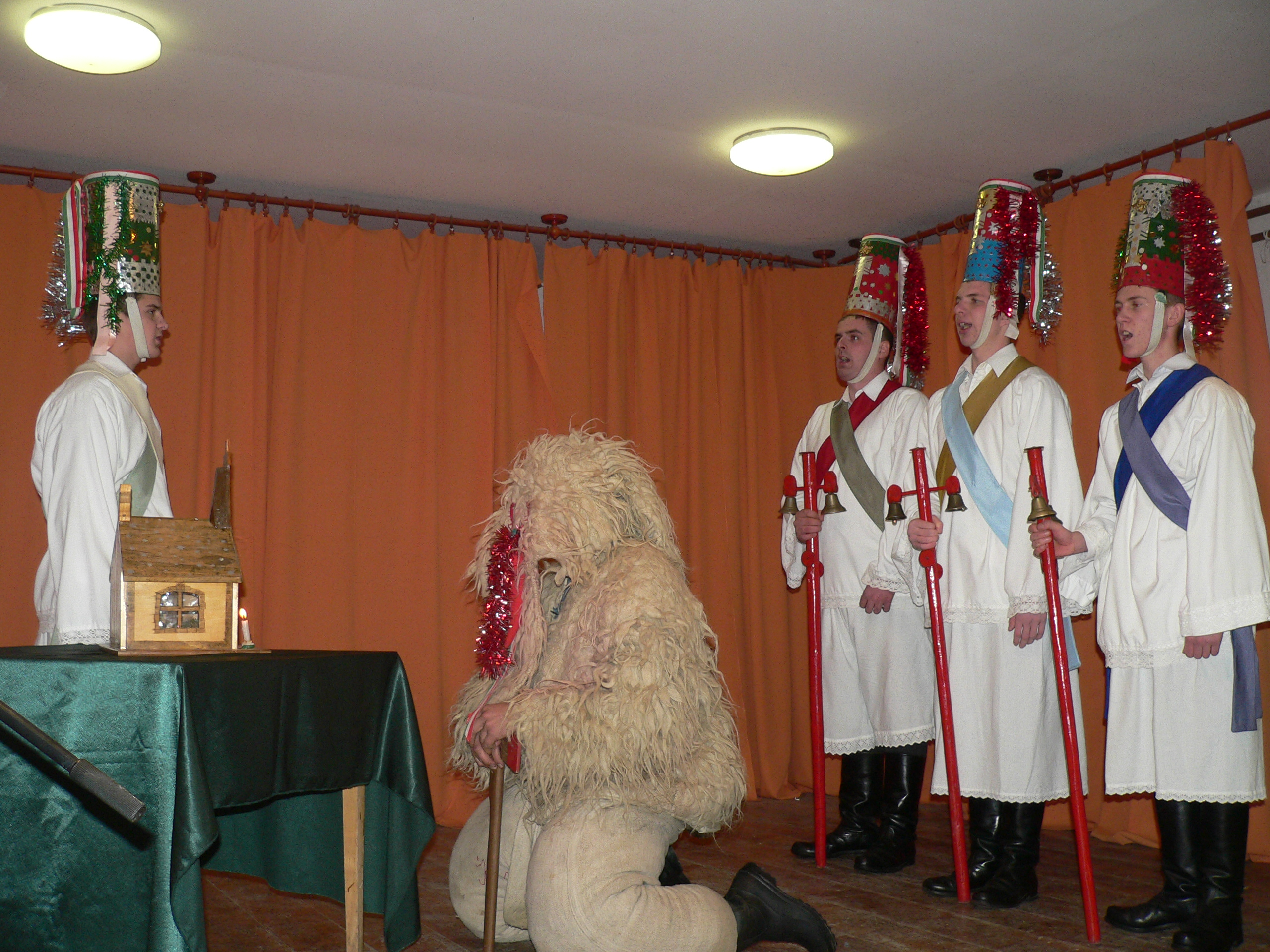 Betlehemes csoport Füzéren